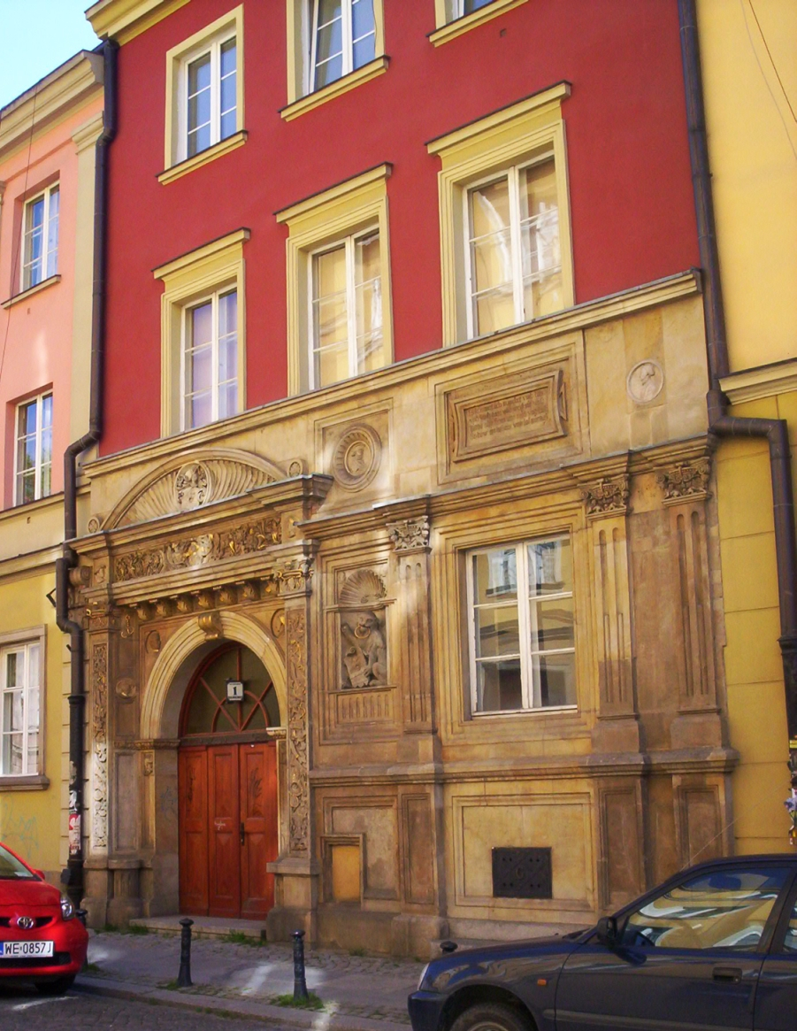 Wrocław. Kamienica Heinricha von Rybischa.